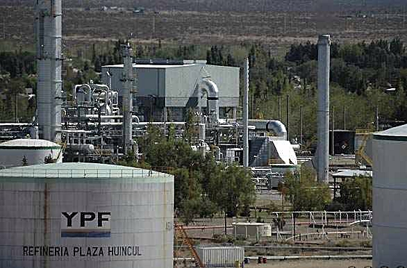 destileria